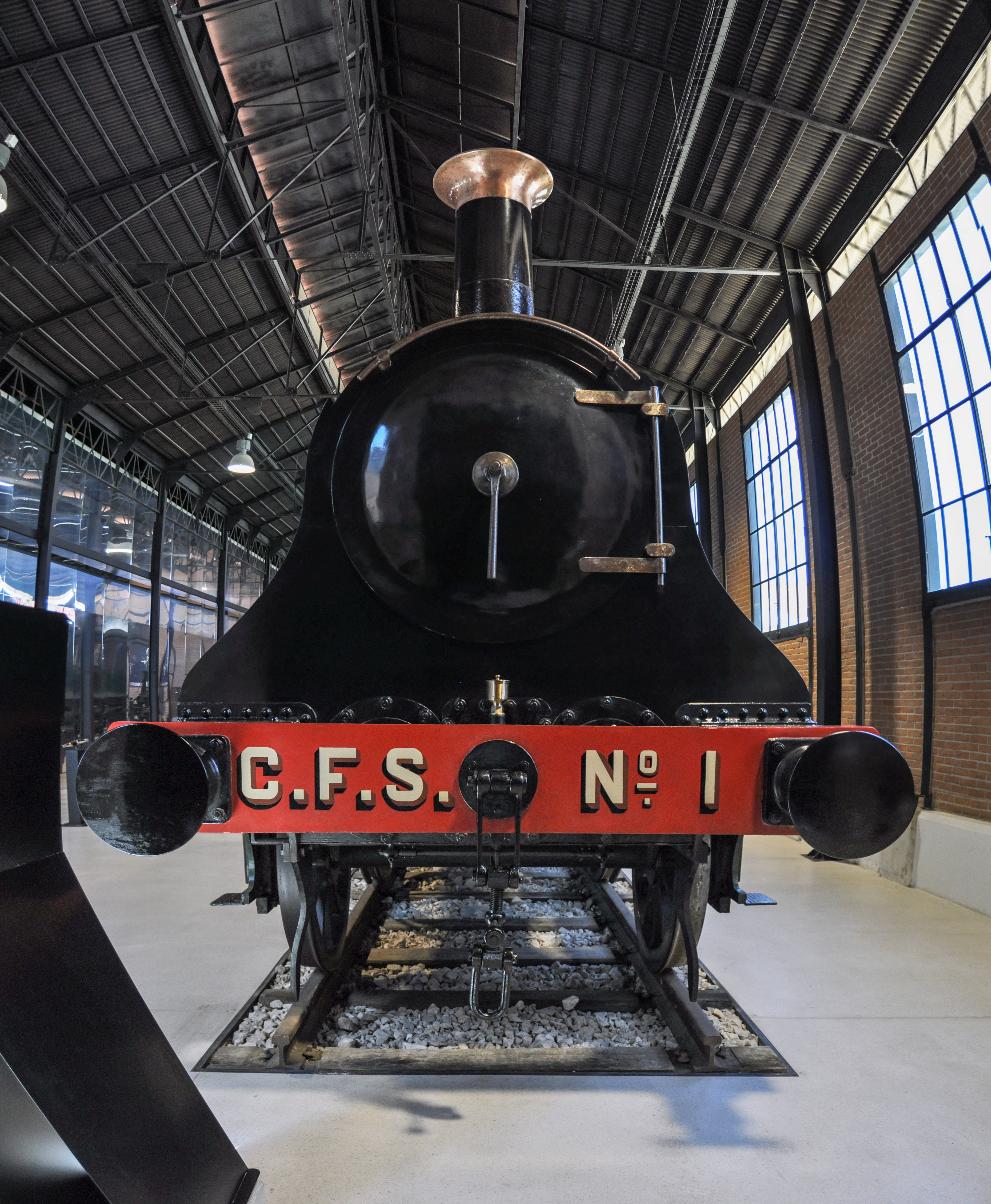 Locomotiva a Vapor Nº1 D. Luíz dos Caminhos-de-Ferro do Sul.